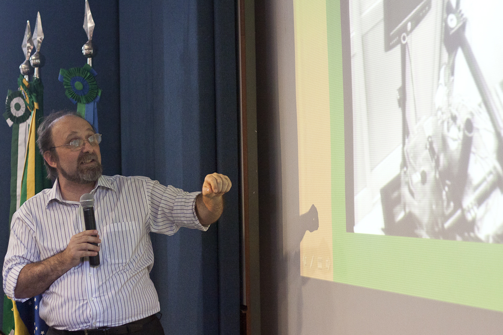 Foto: Mariana Costa